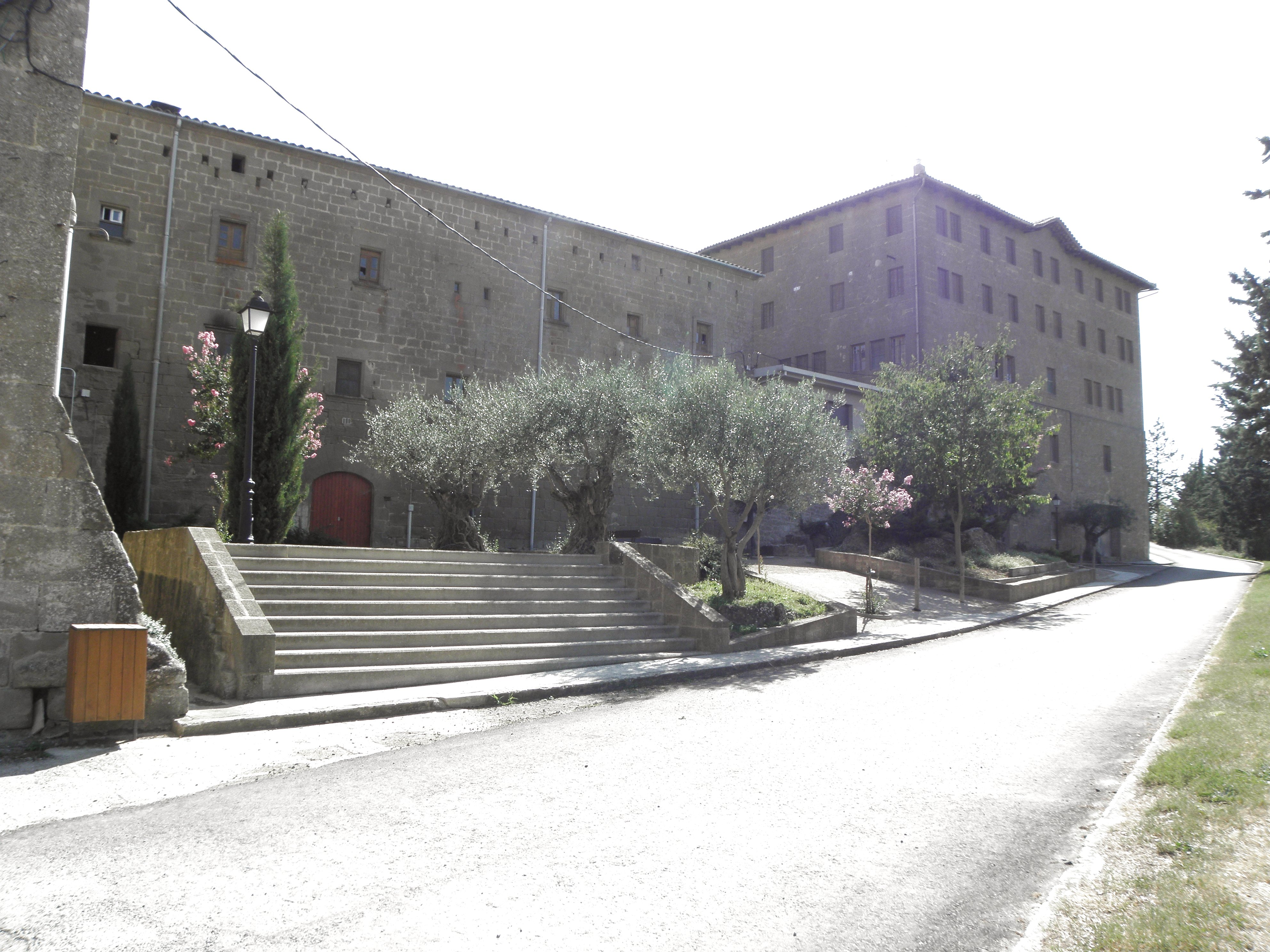 A la dreta de la fotografia, la façana nord de la Casa d'espiritualitat del Santuari d'El Miracle (Riner, Solsonès)